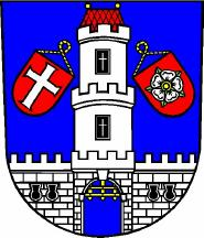 znak meste Strakonice - zdroj